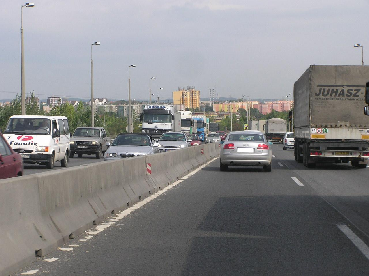 Ansicht auf der Autobahn M0 in Richtung M1 bei Törökbálint, Budapest, Ungarn.